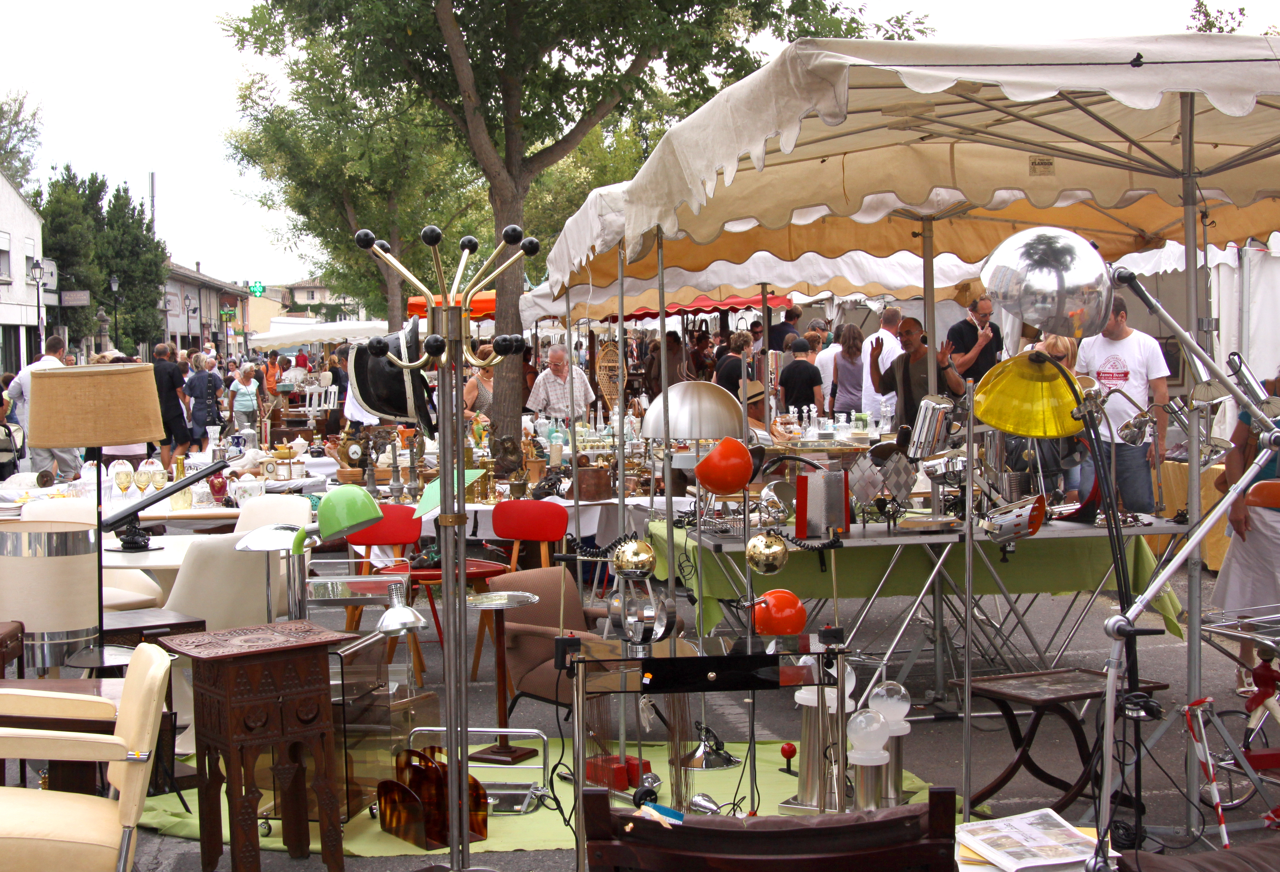 Étalages à l'Isle-sur-la-Sorgue